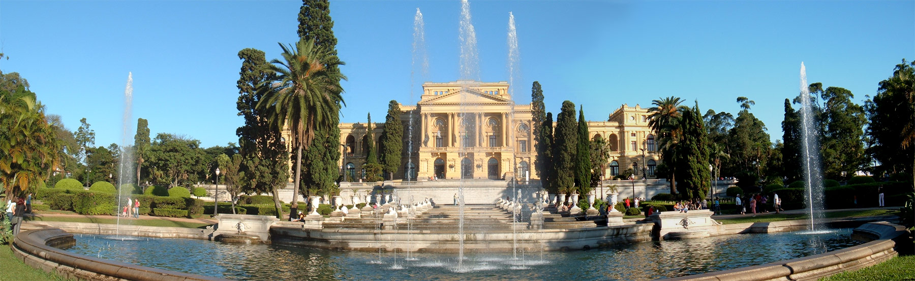 Fotosafari de ontem...